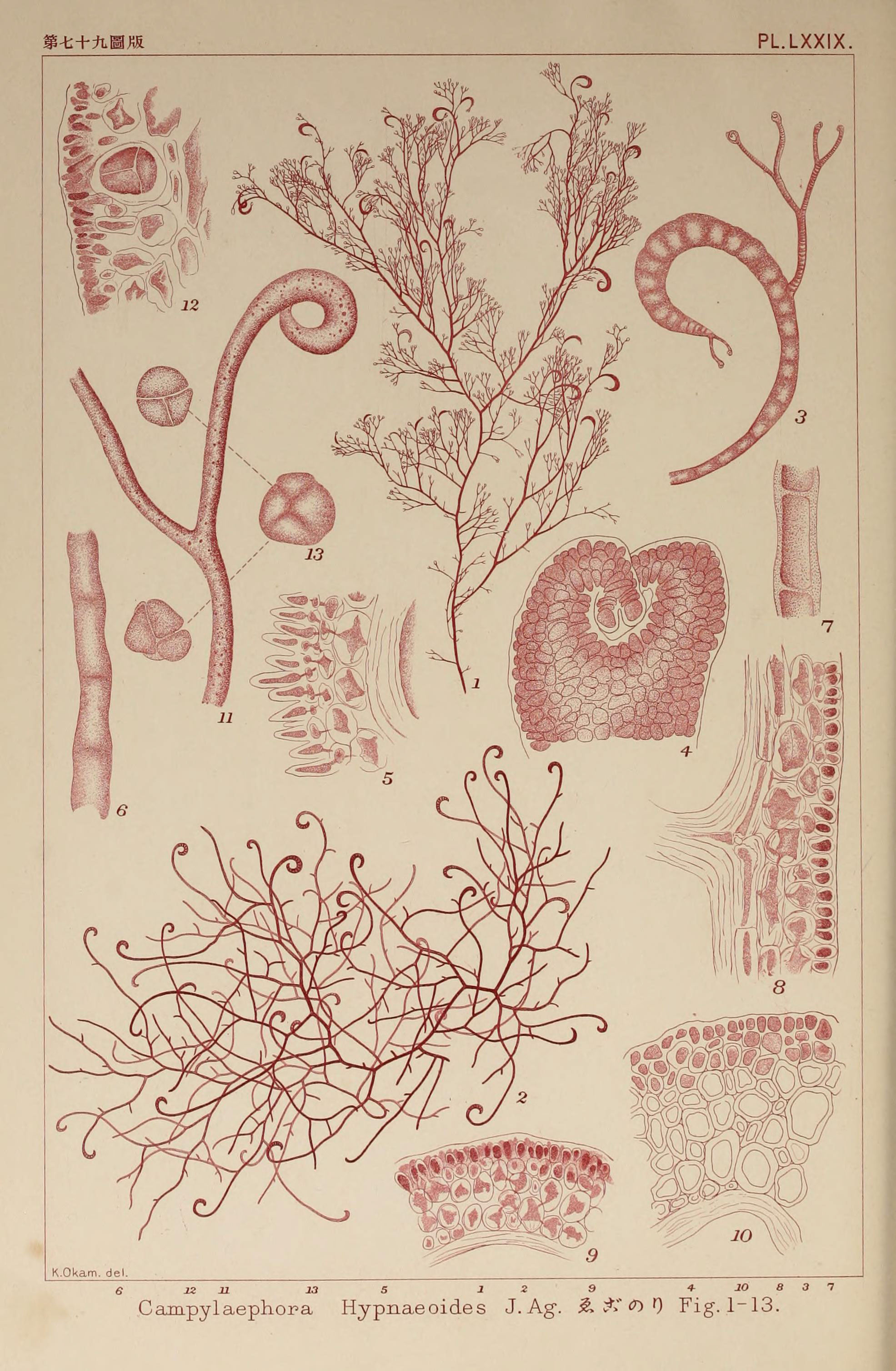 PL.LXXIX. K.Okam. del. jo s a i Campylaephora Hypnaeoides J.Ag. Fig. 1-13.